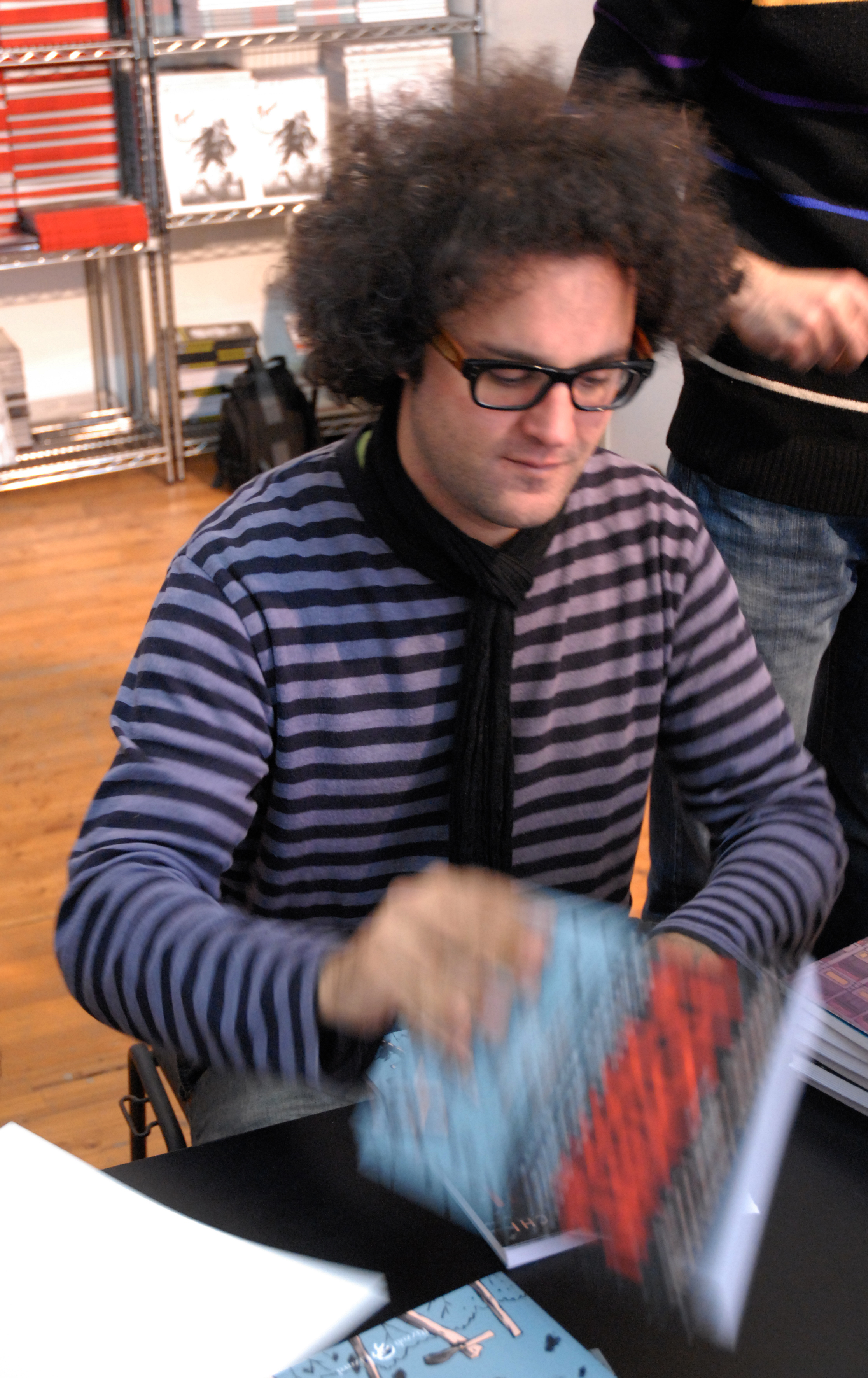 Simone Cristicchi Photo taken during Lucca Comics&Games 2010